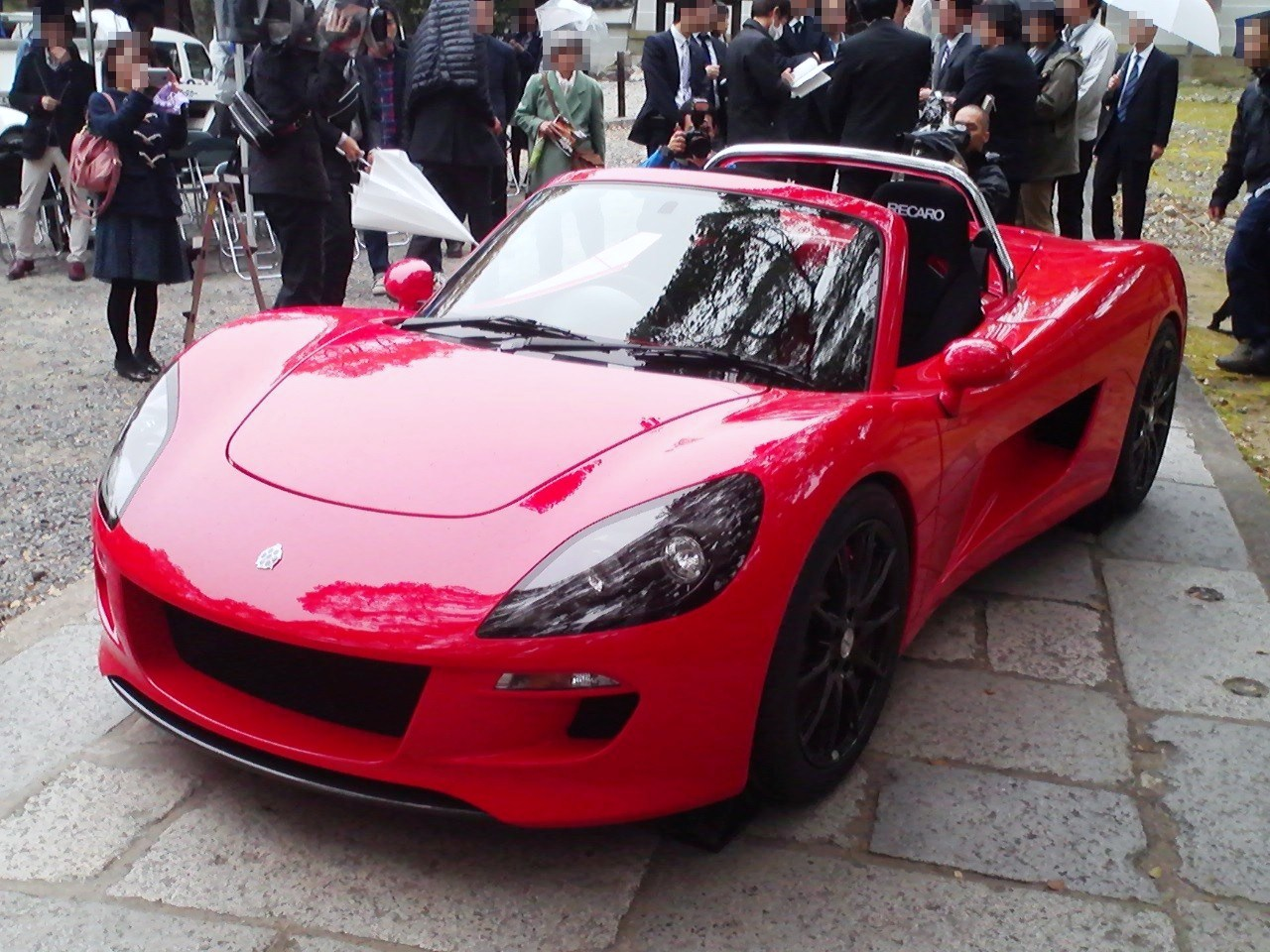 青蓮院門跡にて発表されたグリーンロードモータースによるトミーカイラ・ZZの電気自動車仕様をフロントから撮影。1号車と比較してサイズはほぼ不変だが西田典幸によるデザインとなりZZIIやガライヤを彷彿とさせる外観となった。